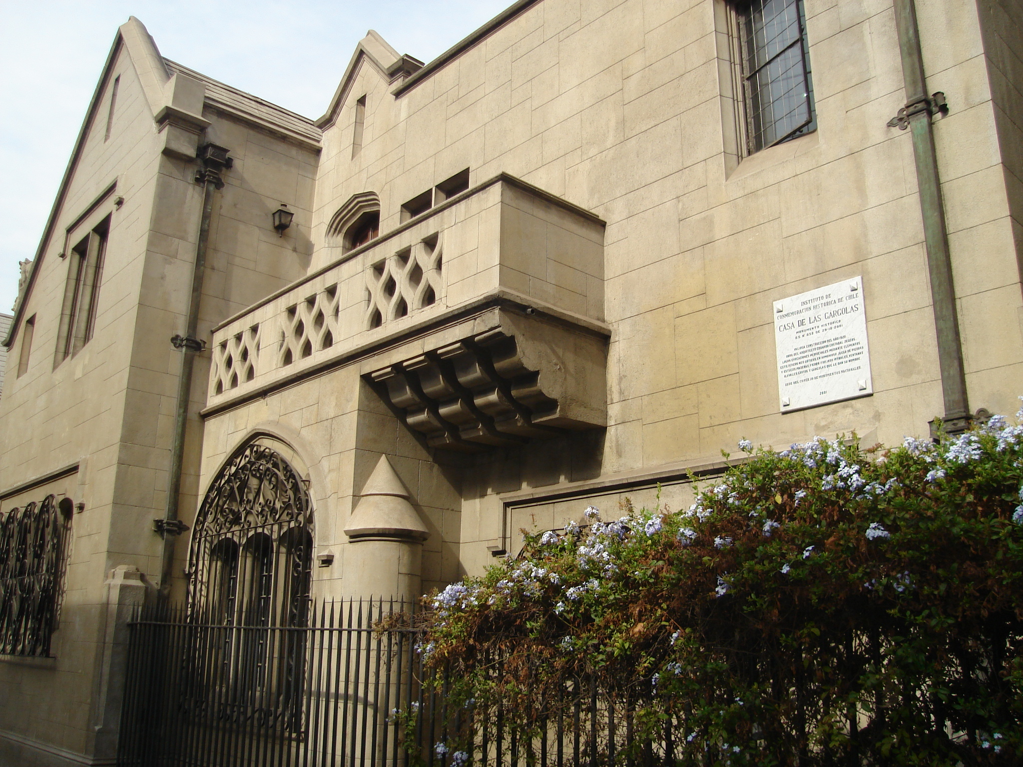 Casa de las Gárgolas, Santiago de Chile.